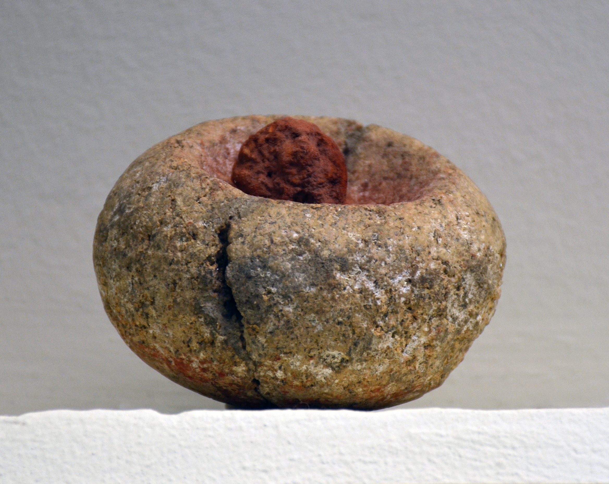 Godet à ocre, Paléolithique supérieur, provenant de la grotte de la Laugerie ( haute-Dordogne ). Musée Saint-Remi à Reims.